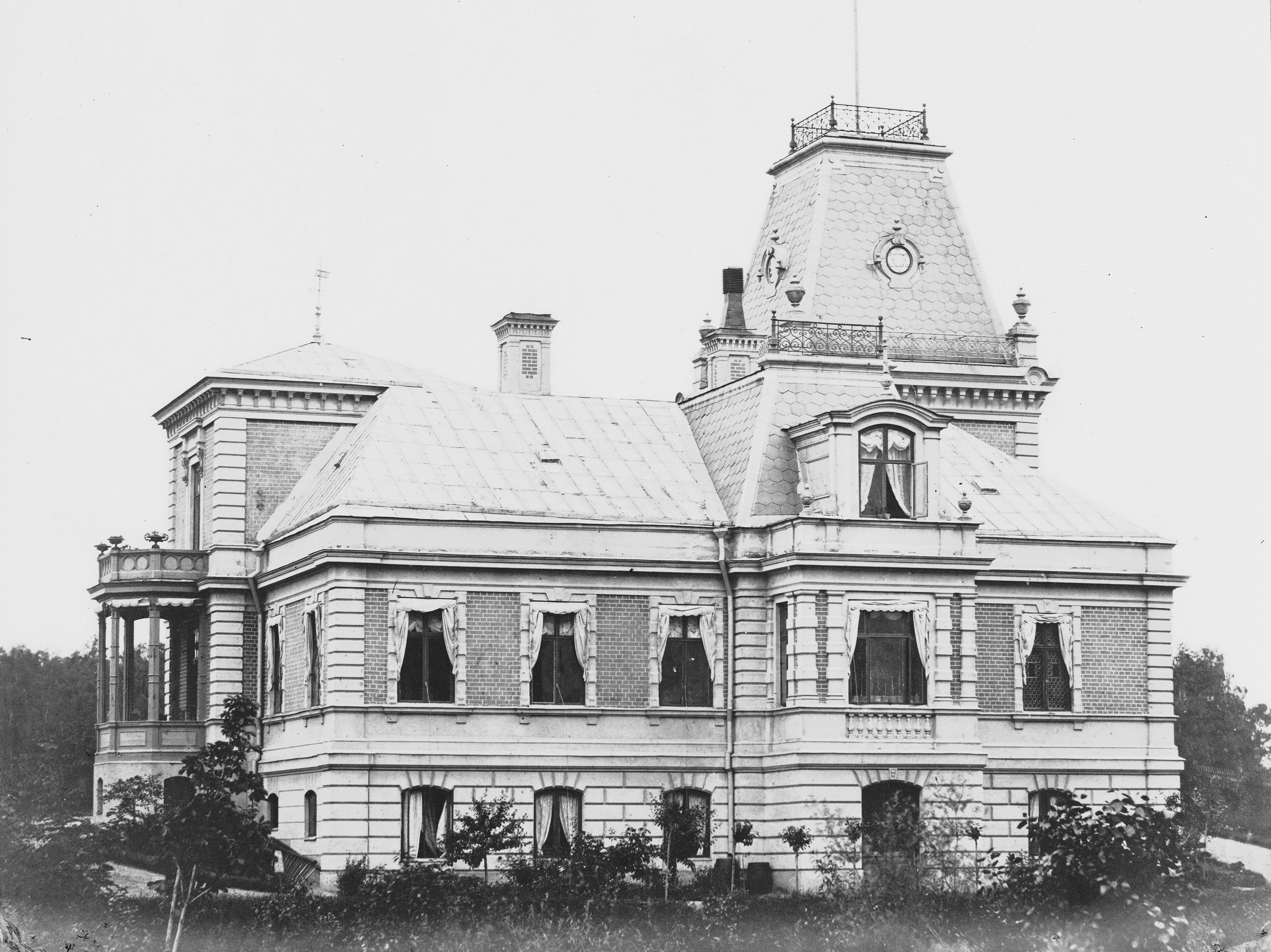 Wallenbergska villan, Brahegatan 47-49. Uppförd 1876-77 för grosshandlaren och generalkonsuln Otto Blanck. Förvärvad av Knut Wallenberg 1883. Ombyggd enligt Edward Ohlssons ritningar 1899. Riven 1962